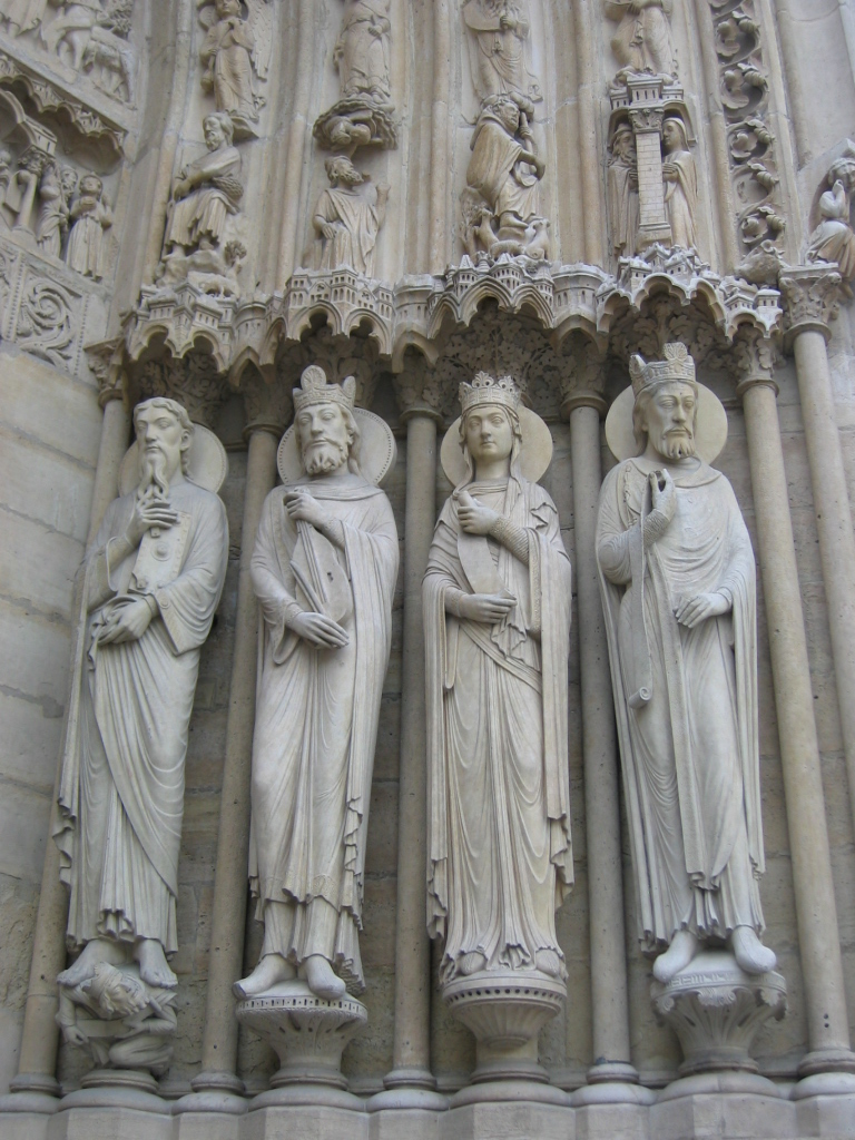 Cathédrale Notre-Dame de Paris: portail de droite